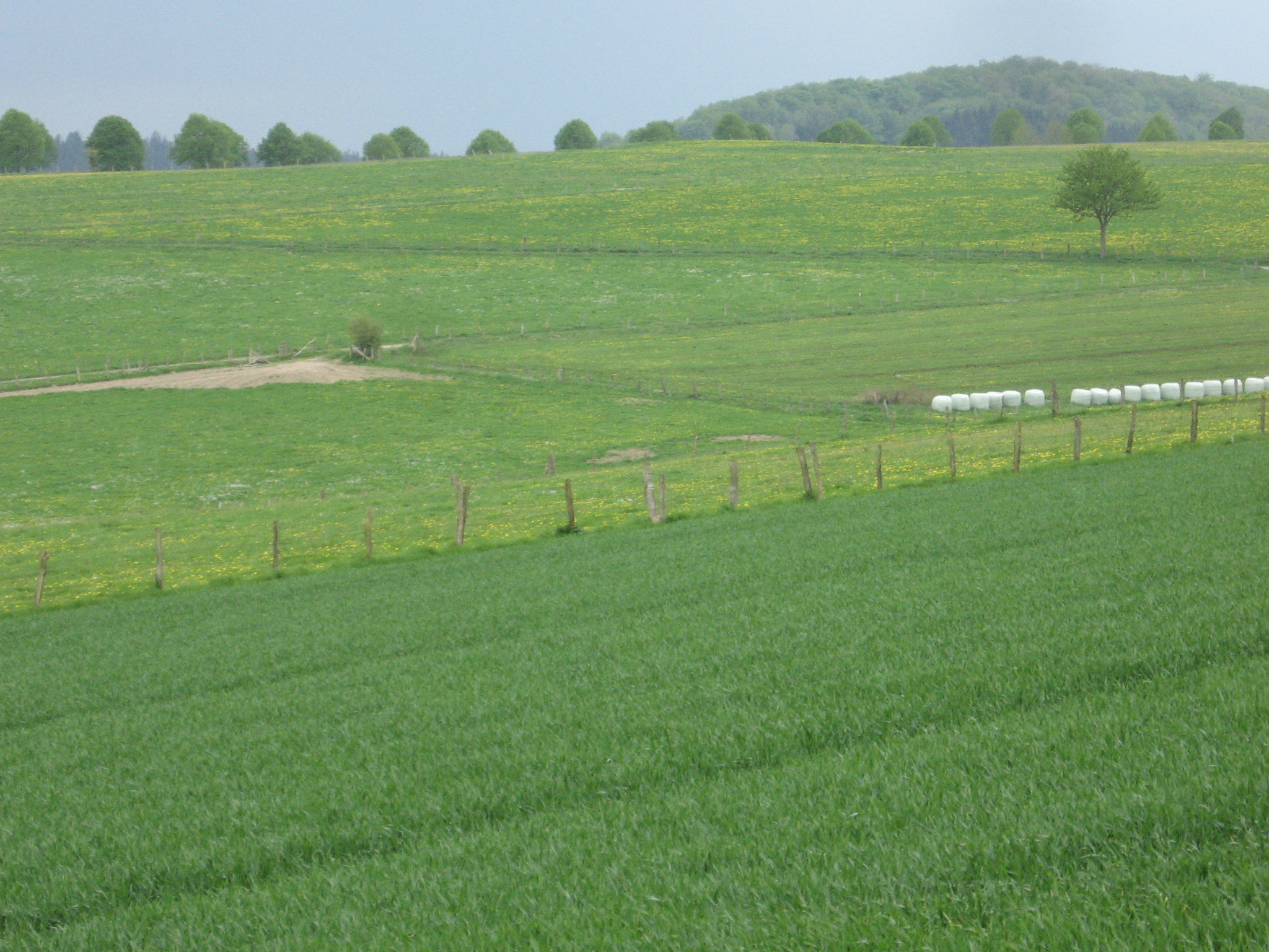 Schwalgloch Wintertal befindet sich in der Bildmitte und ist umgeben vom Landschaftsschutzgebiet Wintertal / Escherfeld. Es ist nur noch als eine Kuhle in der Landschaft wahrnehmbar.